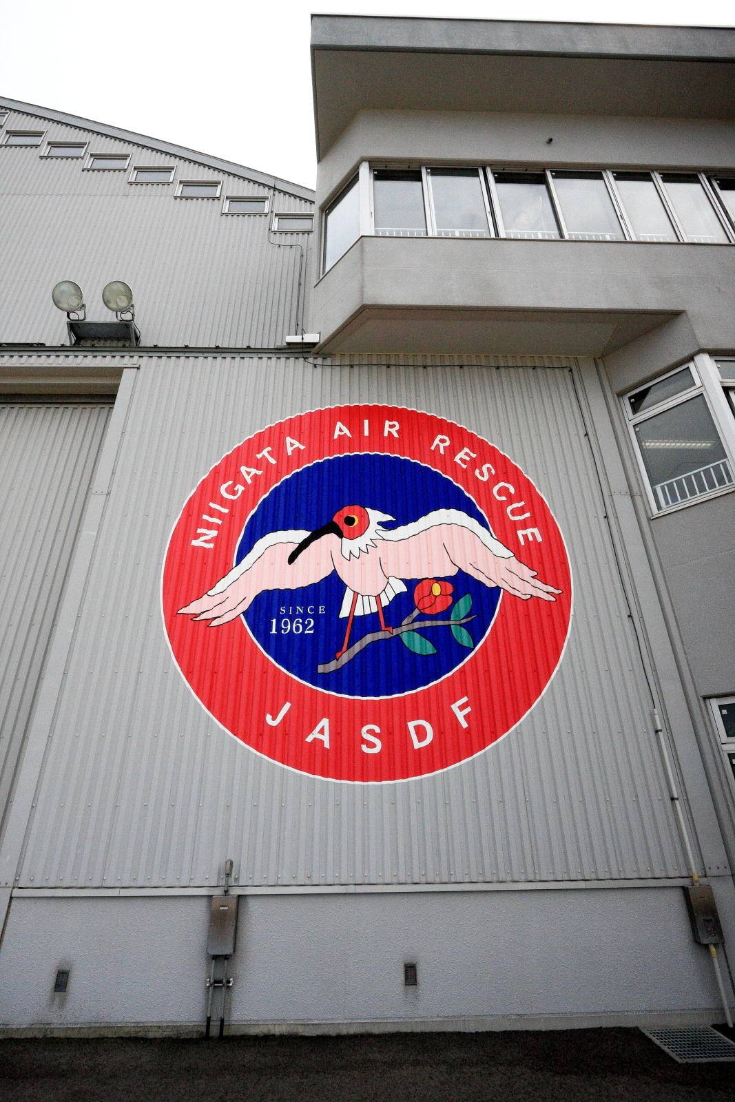 航空自衛隊新潟救難隊